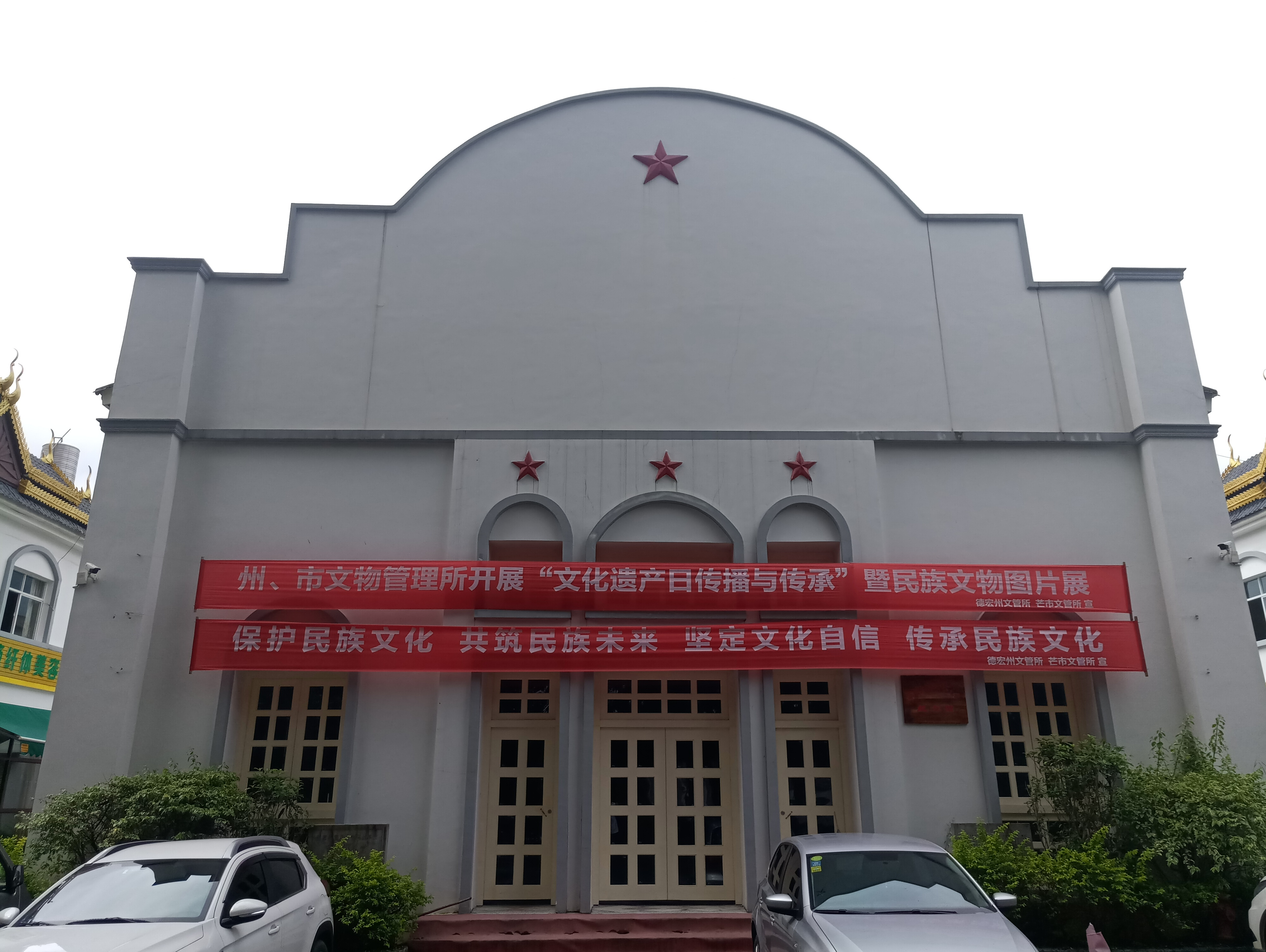 中文（中国大陆）: 芒市小礼堂-正面